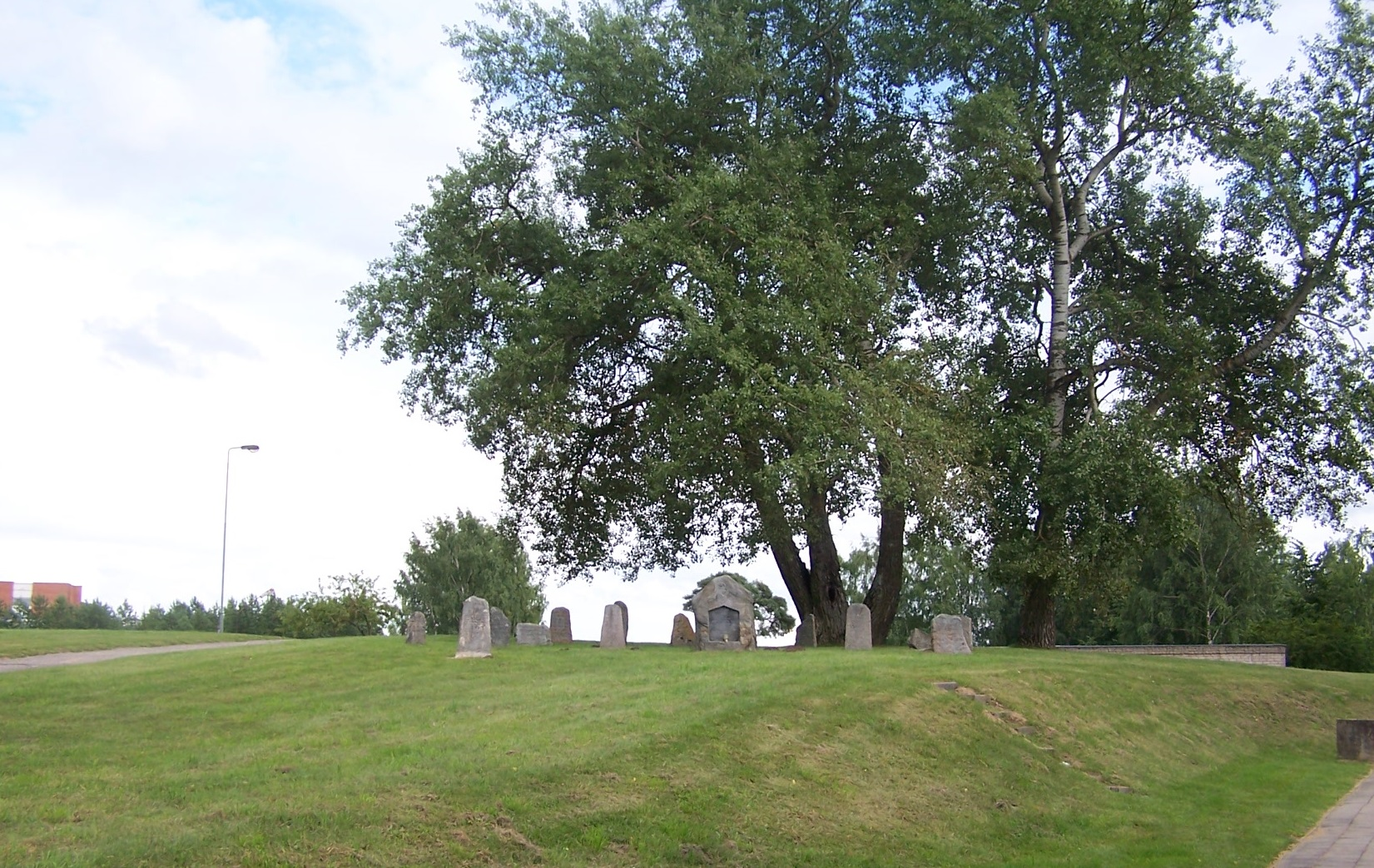 Kupiškio žydų kapinės